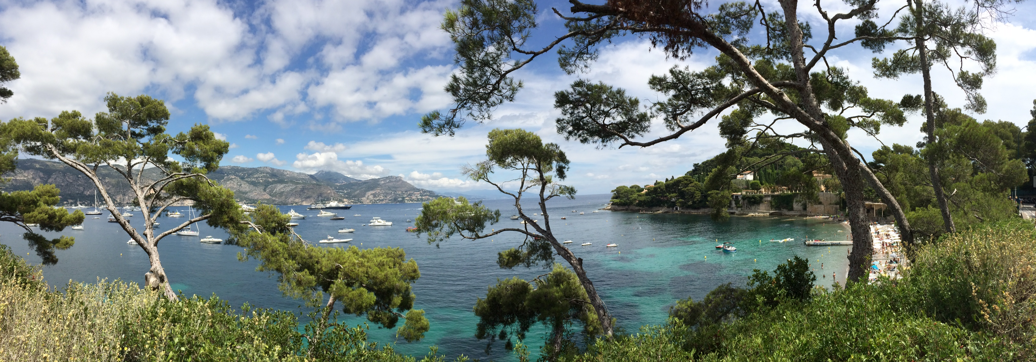 Paloma Beach Bucht, Saint-Jean-Cap-Ferrat